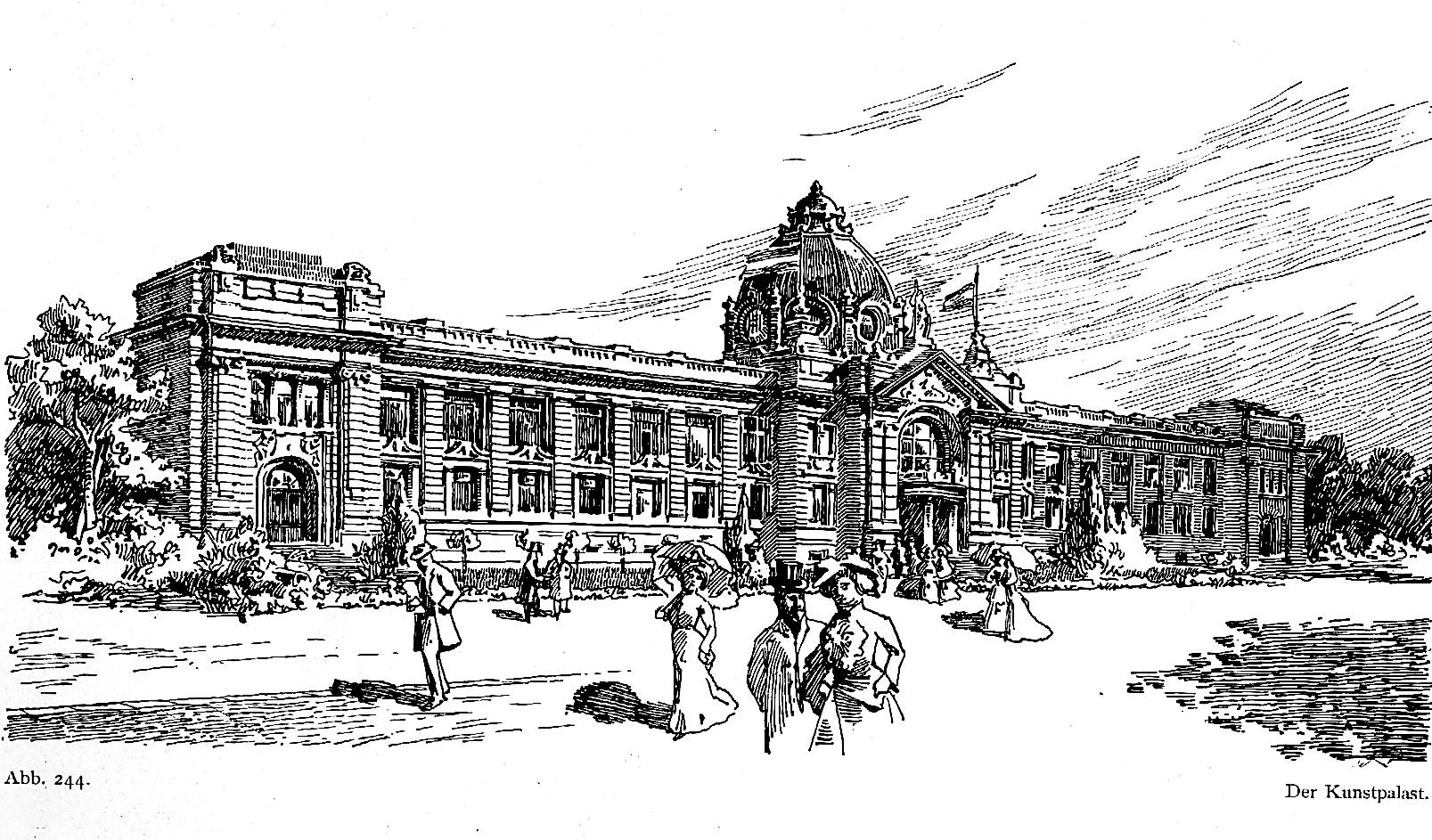 Kunstpalast in Düsseldorf, erbaut für die Industrie- und Gewerbeausstellung Düsseldorf im Jahr 1902, Grundriss Entwurf Albrecht Bender, Fassade Entwurf Eugen Rückgauer.jpg